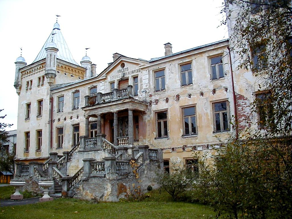 Kalkūnes pils 2000-10-15